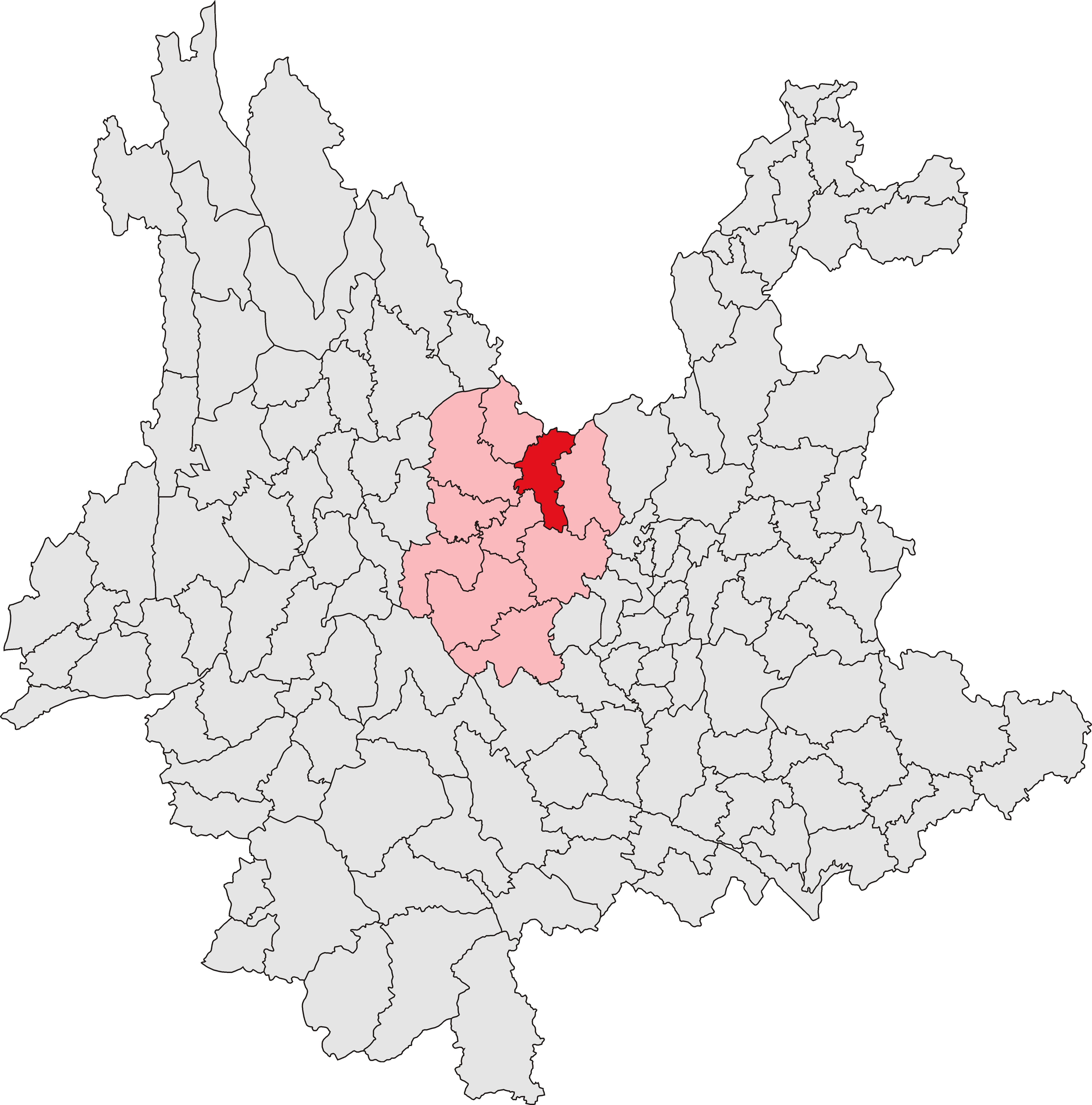 中文（中国大陆）: 元谋县位置图